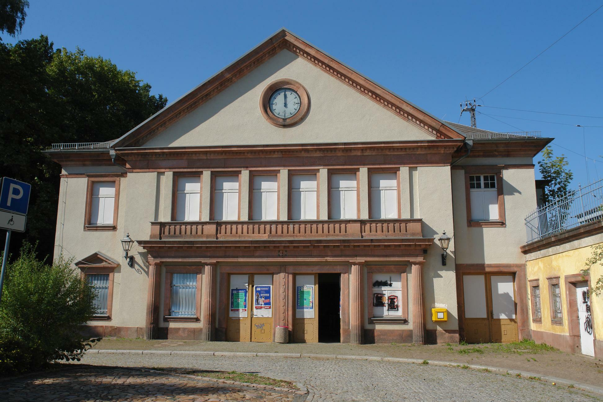 Bahnhofsgebäude in Waldheim